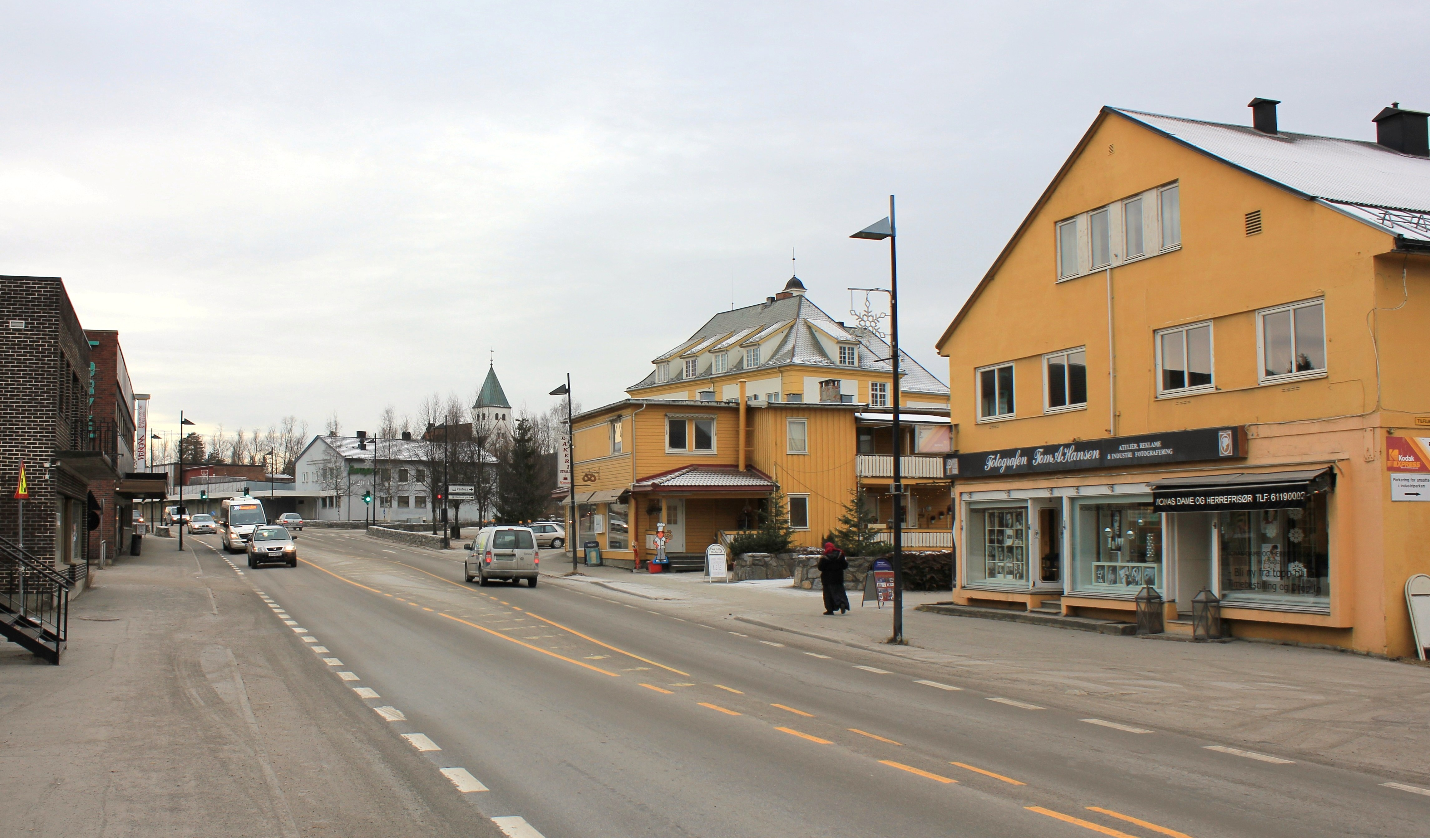 Raufoss sentrum.